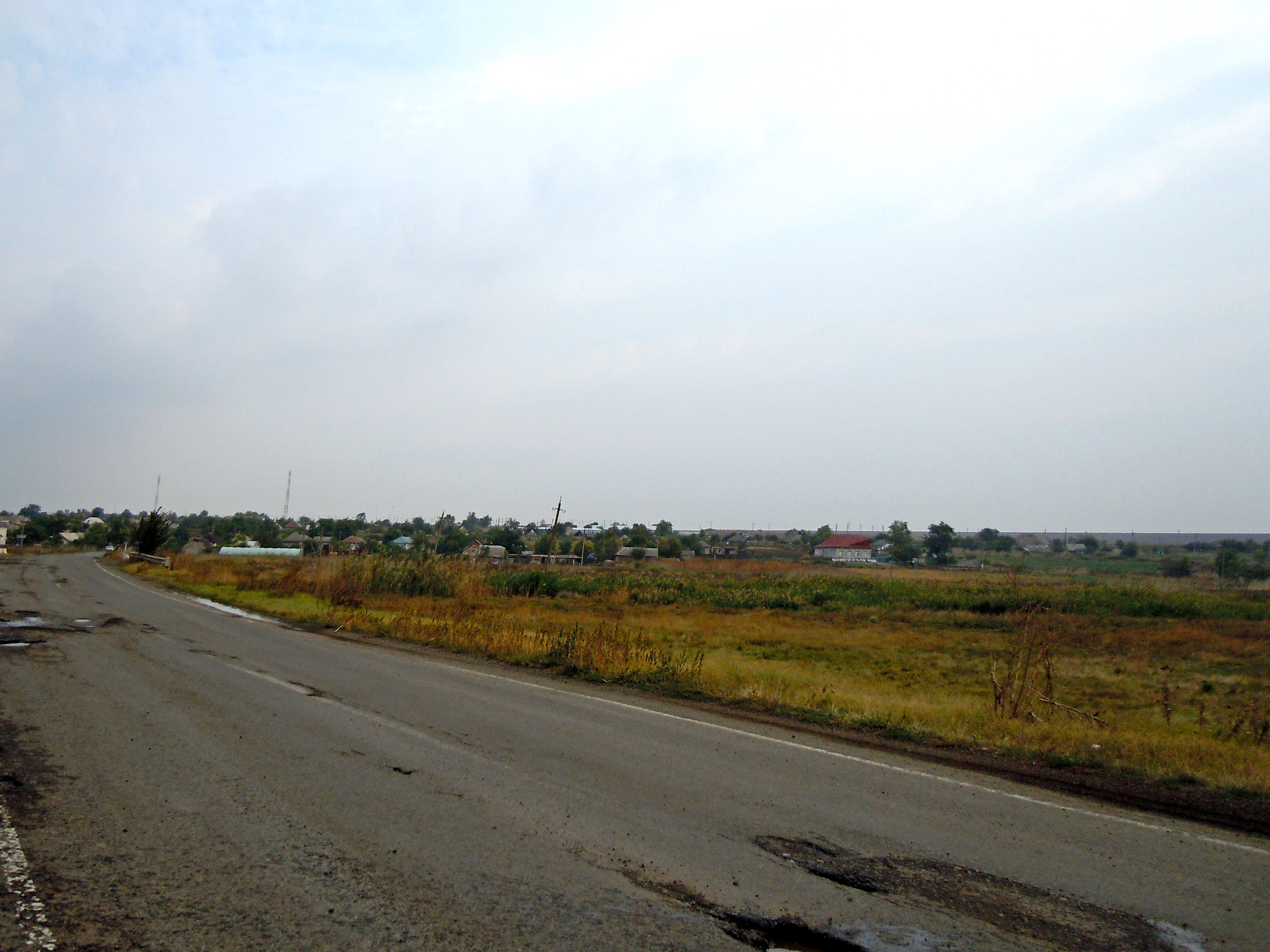 Вигляд на село Баннівка, Болградський район Одеської області